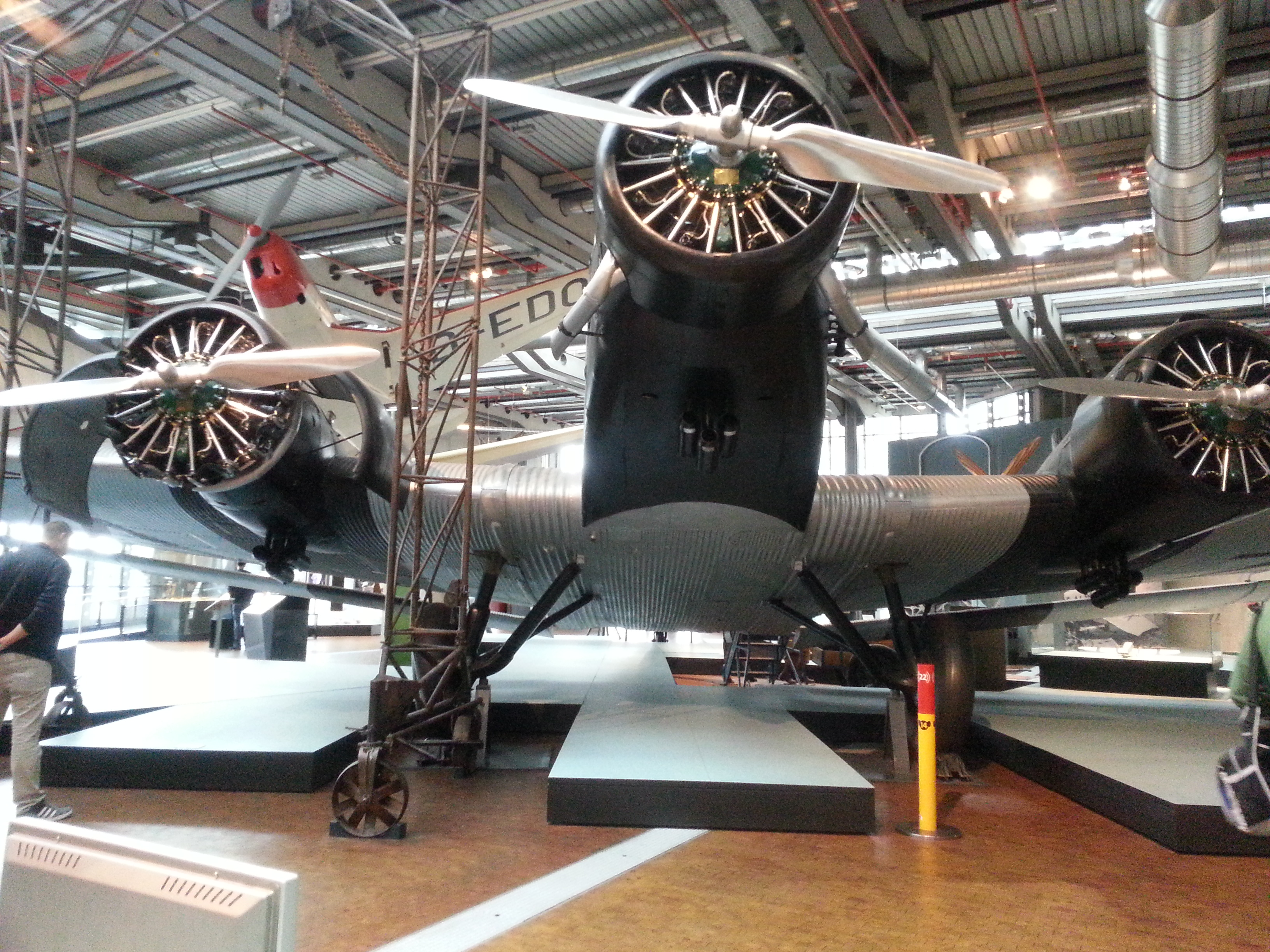 Ju 52